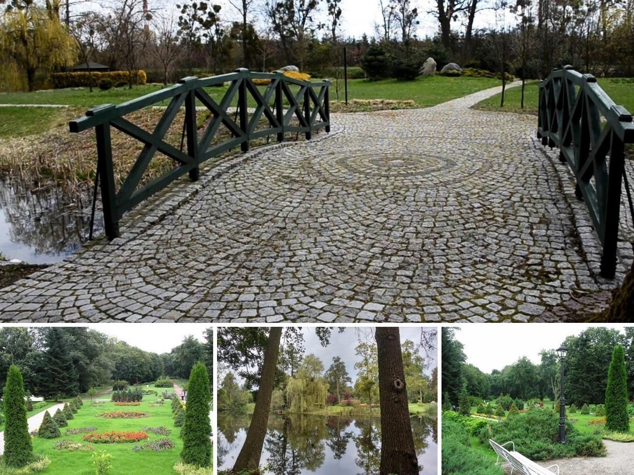 W biskupim ogrodzie.